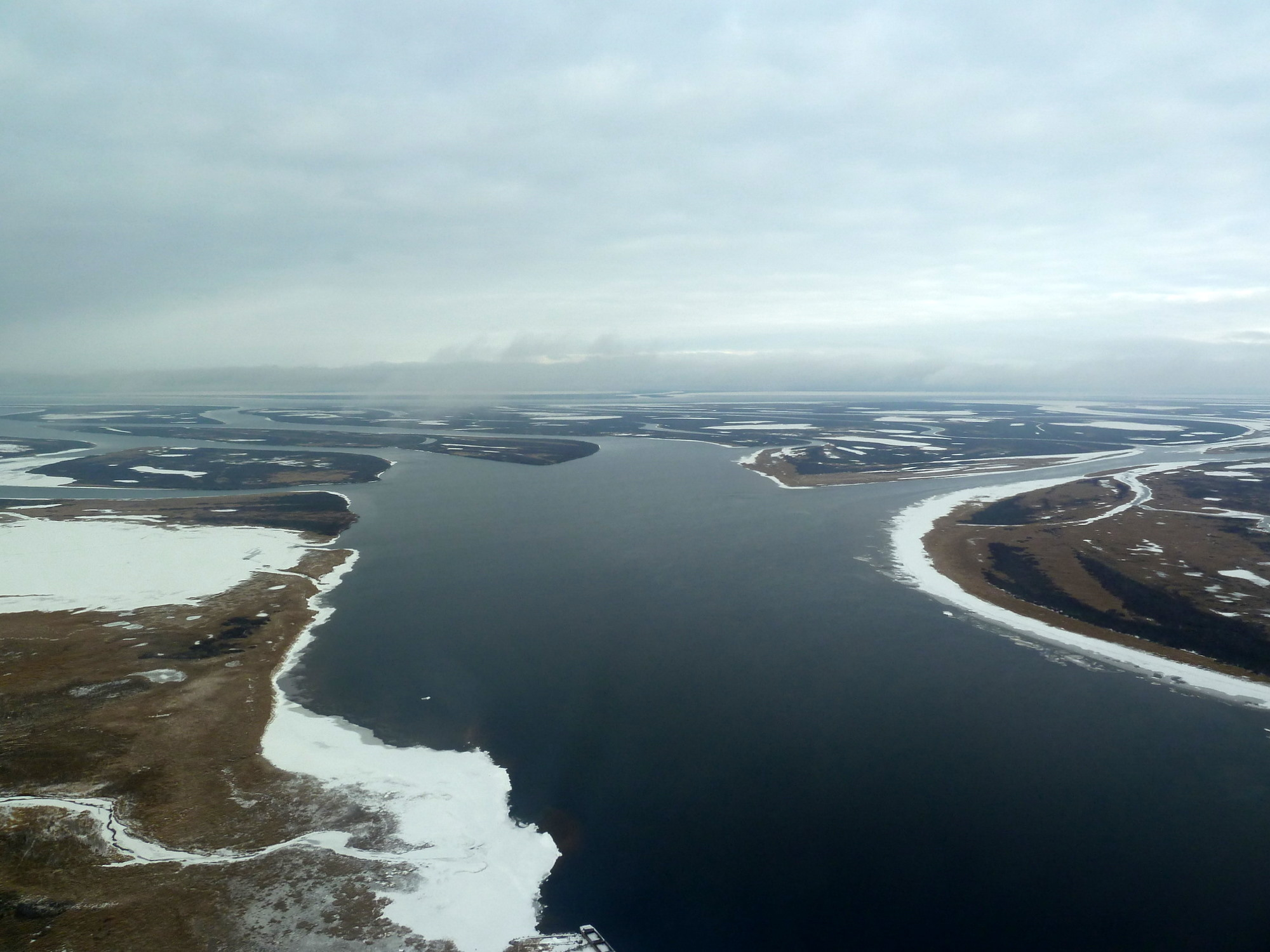 Река Таз. Ямало-Ненецкий автономный округ